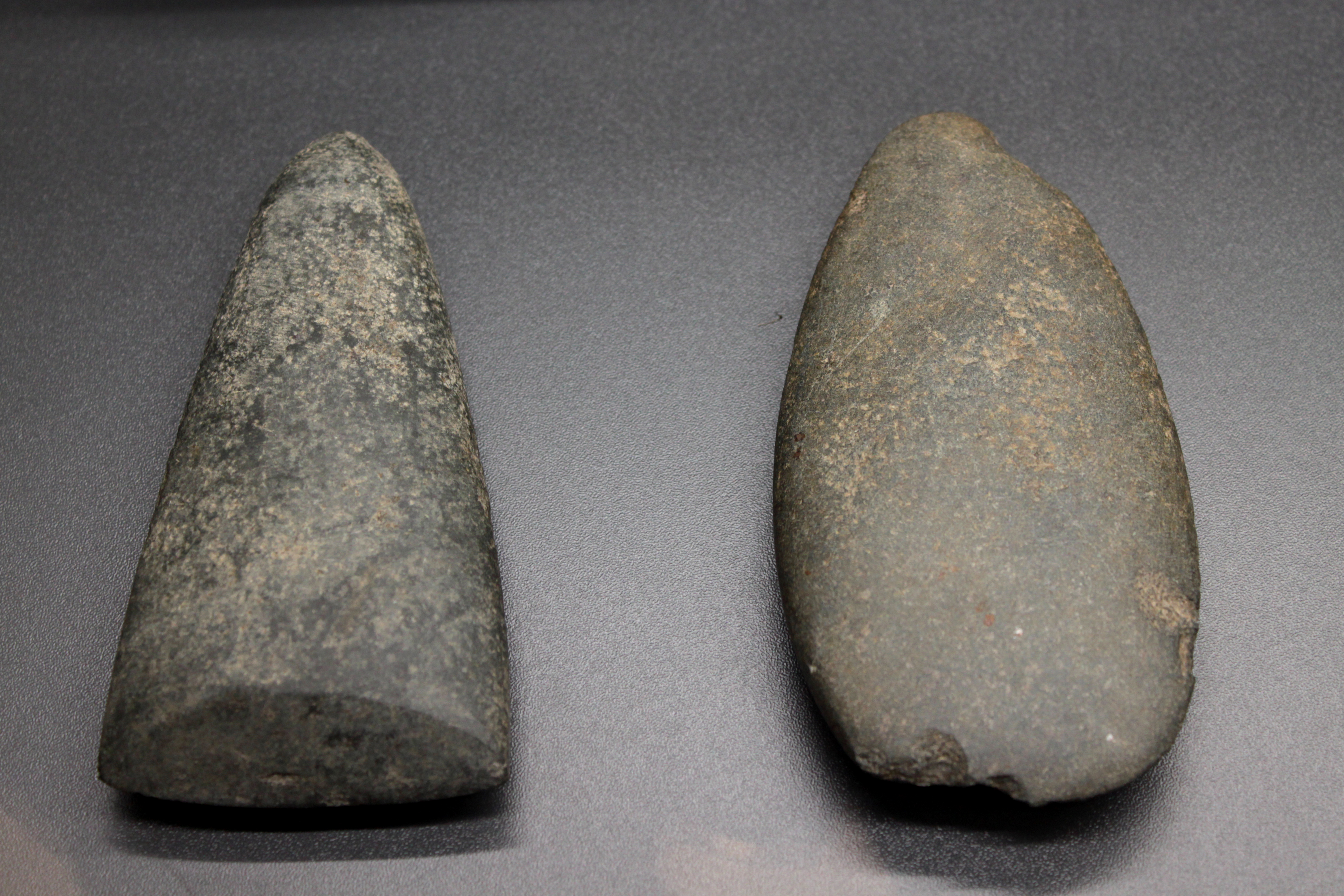 Hachas pulimentadas de la Edad de Bronce/Calcolítico (primer o segundo milenio A.C.) localizadas en un yacimiento de la garganta del río de la Miel de Algeciras. Museo municipal de Algeciras, Andalucía, España.